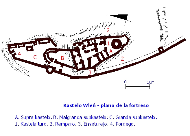 Plan zamku Wleń